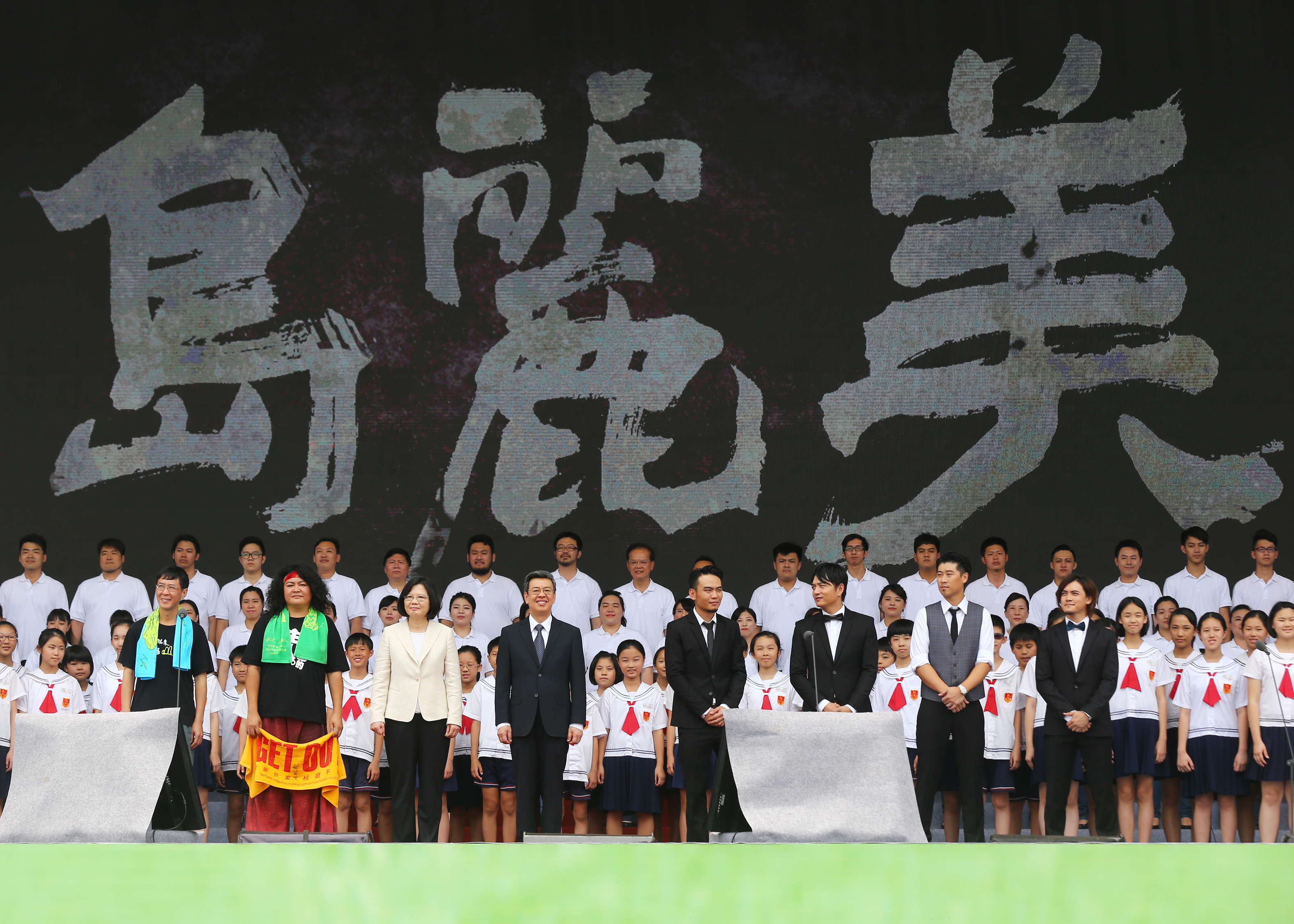 中華民國第十四任總統、副總統就職慶祝典禮，國立實驗合唱團與臺北市松山區敦化國民小學合唱團共同帶領總統蔡英文、副總統陳建仁與全場群眾合唱《美麗島》。